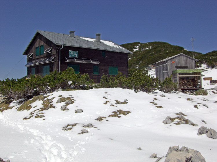 Rieder Hütte im Höllengebirge, Oberösterreich